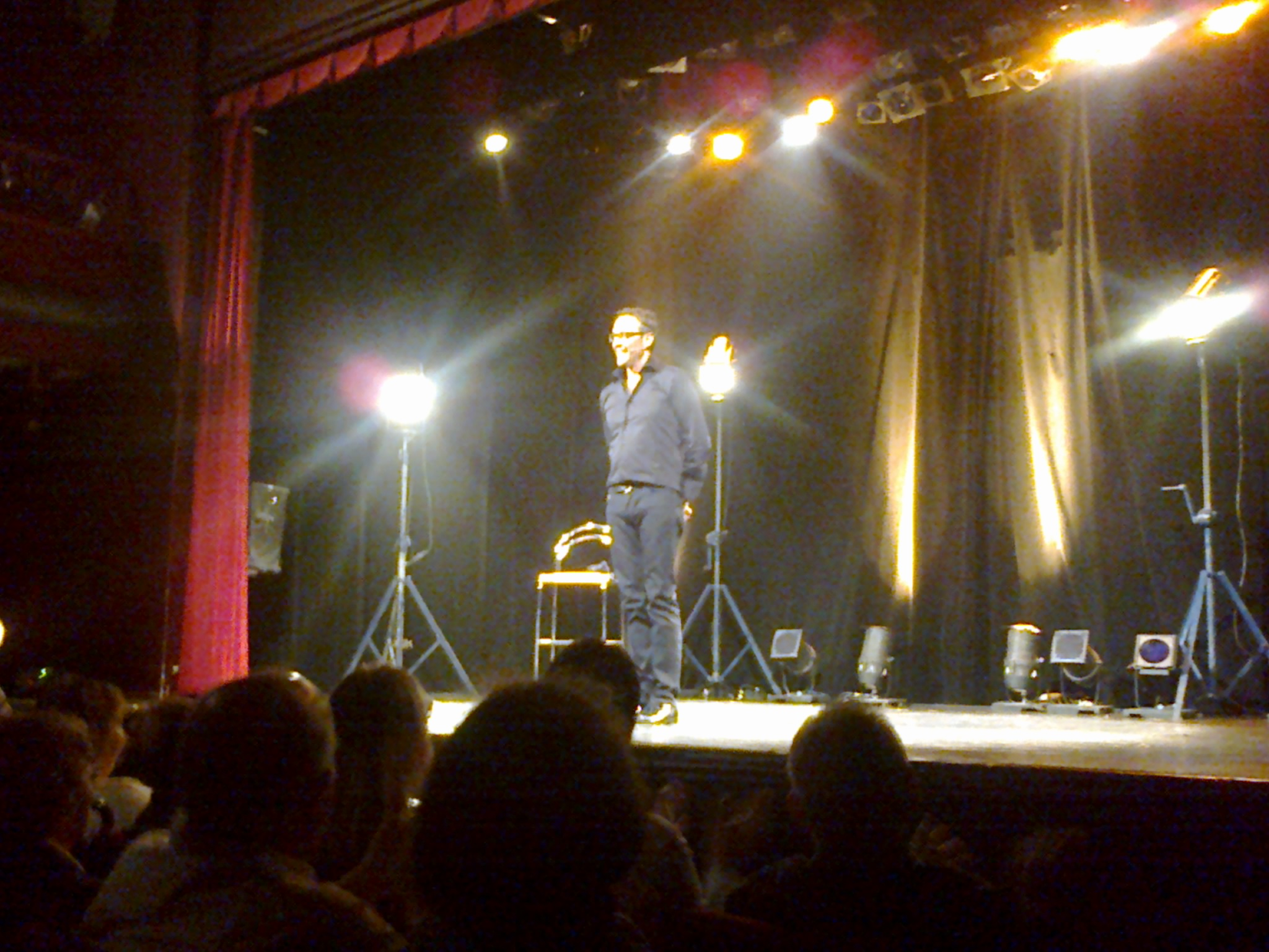 Julien Courbet en spectacle au théatre Trévise